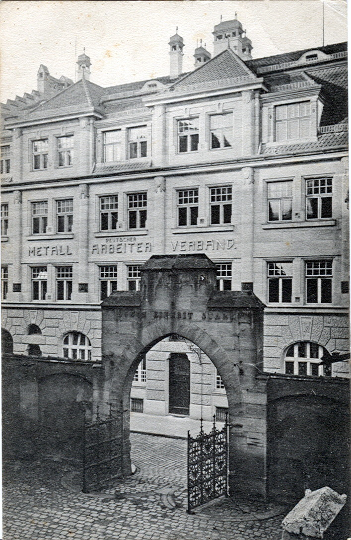 Postkarte, undatiert. Beschriftung: "Neubau Deutscher Metall-Arbeiter Verband. Erbaut 1907-1908. Entwurf und Bauleitung: Ochsenmayer & Wissenmüller, Architekten, Nürnberg."